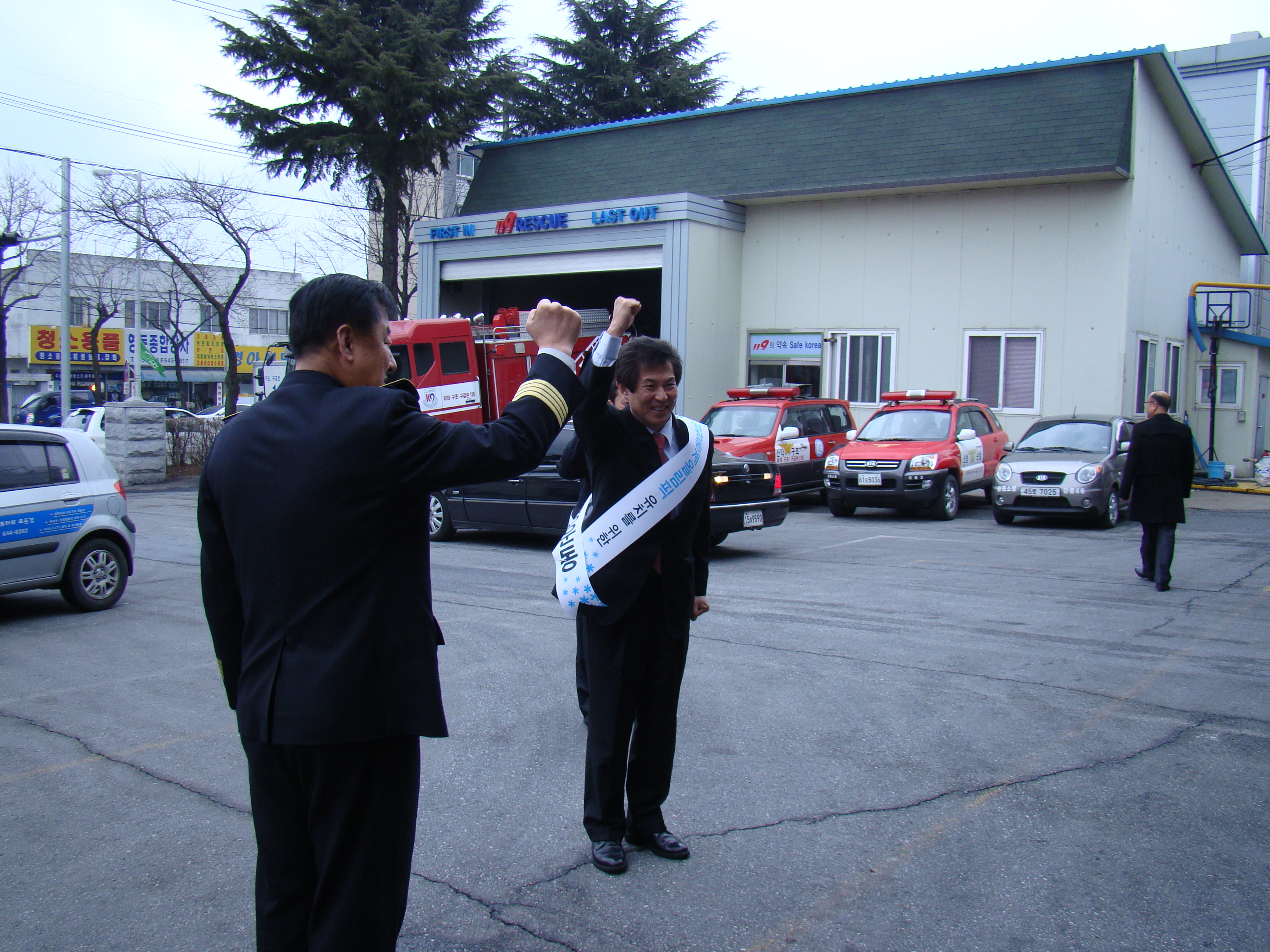 Photos of Gangwon-do Fire and Rescue Service